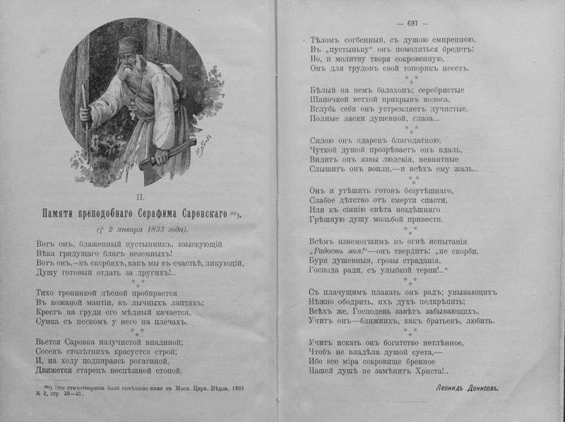 Стихотворение Епископа Арсения (в миру Леони́д Ива́нович Дени́сов) о преп. Серафиме Саровском, написанное к торжеству канонизации о. Серафима в 1903 г. Иллюстрация из книги Денисов Л. И. «Житие, подвиги, чудеса, духовные наставления и открытие святых мощей преподобного и богоносного отца нашего Серафима, саровского чудотворца» 1904 г.